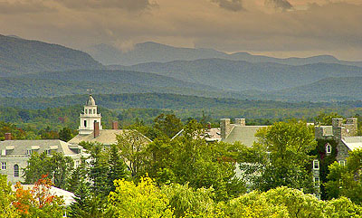 Old chapel, Middlebury College